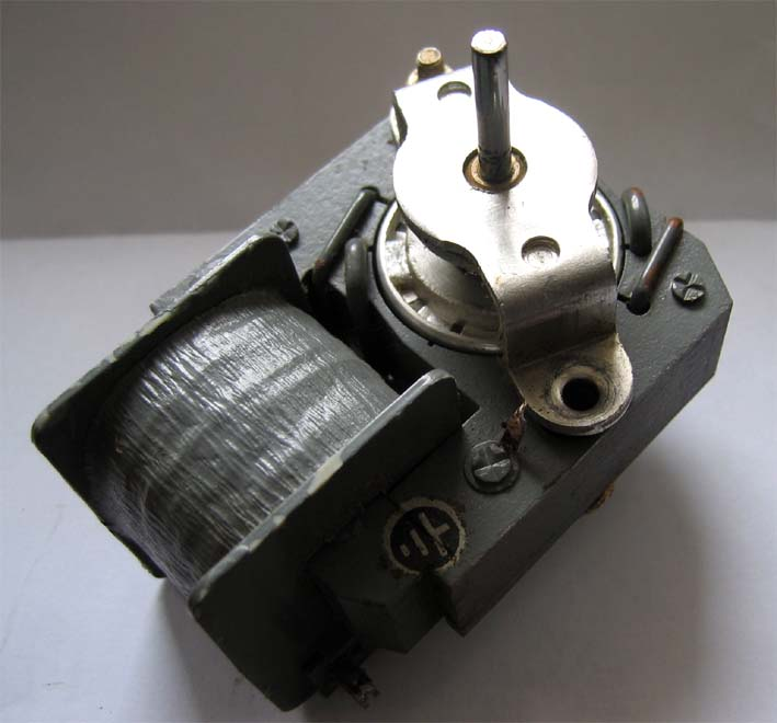 Spaltpolmotor, Eigene Aufnahme